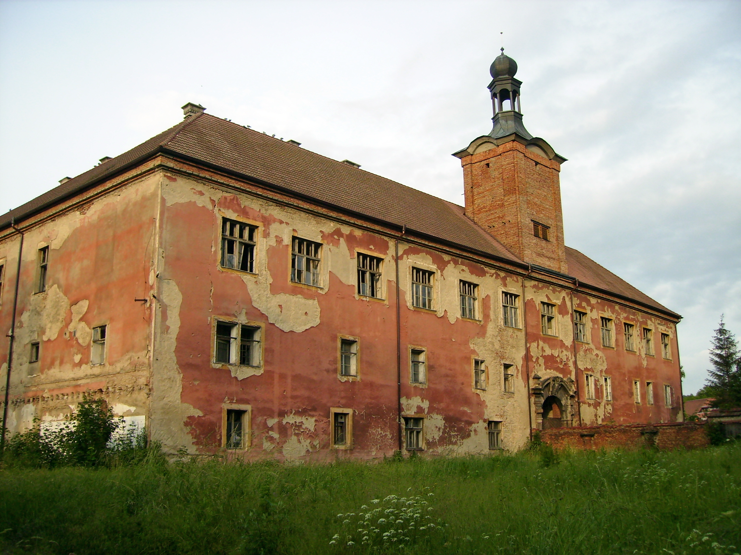 vyhořelý a zchátraný zámek ve středočeských Kounicích.